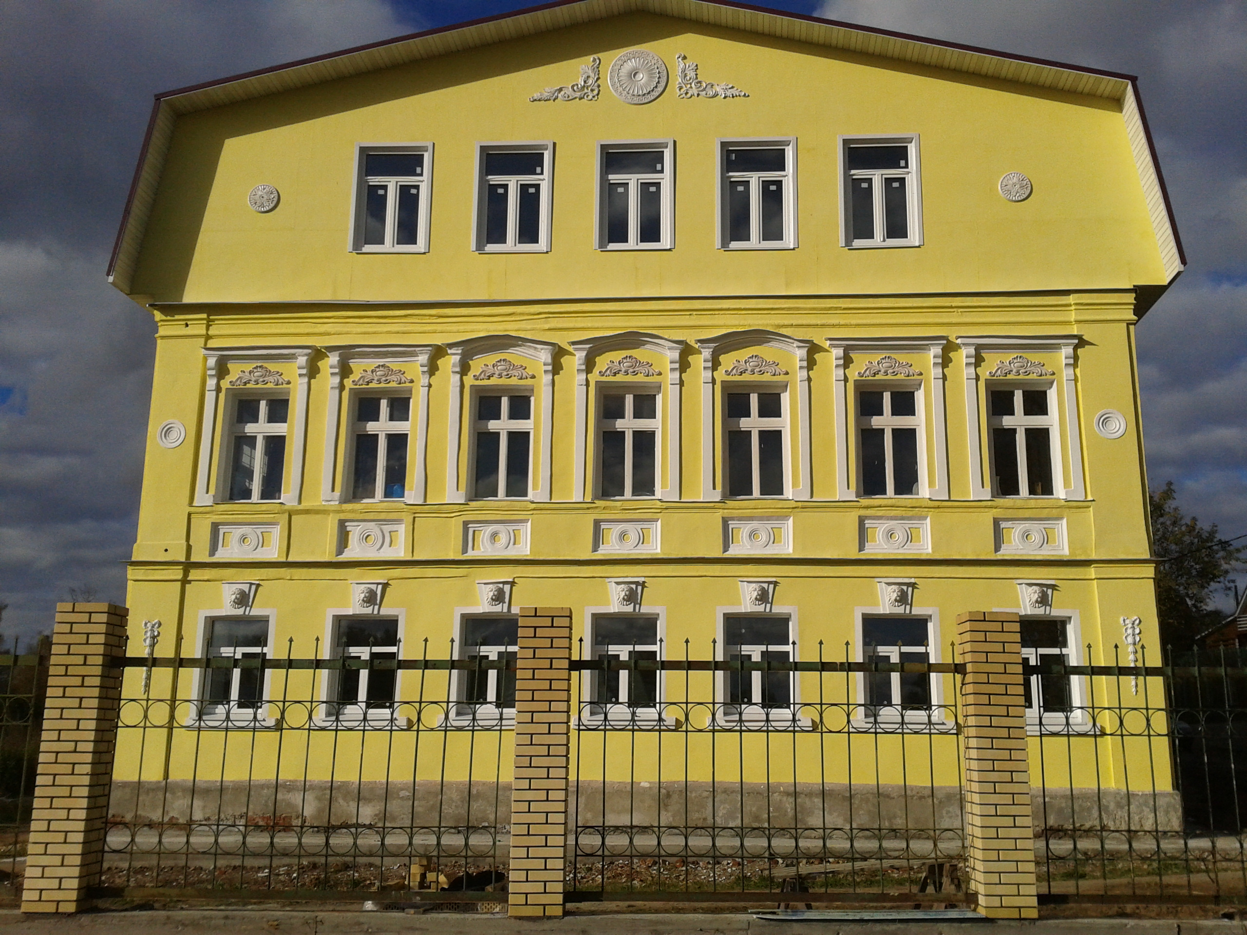 Архитектурный памятник в селе Толбухино